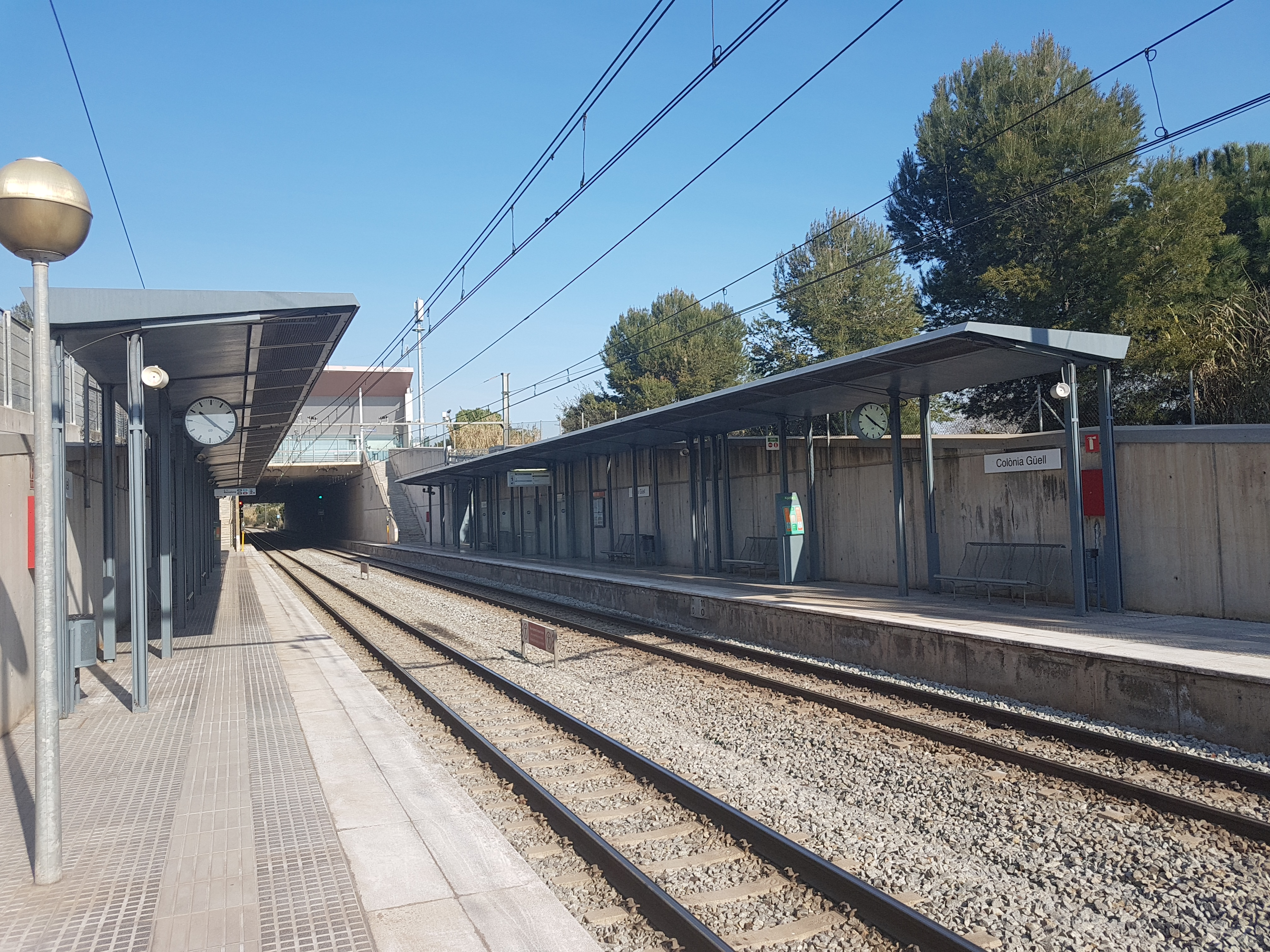 Estació de la Colònia Güell de la línia Llobregat-Anoia al tram entre Barcelona i Martorell.